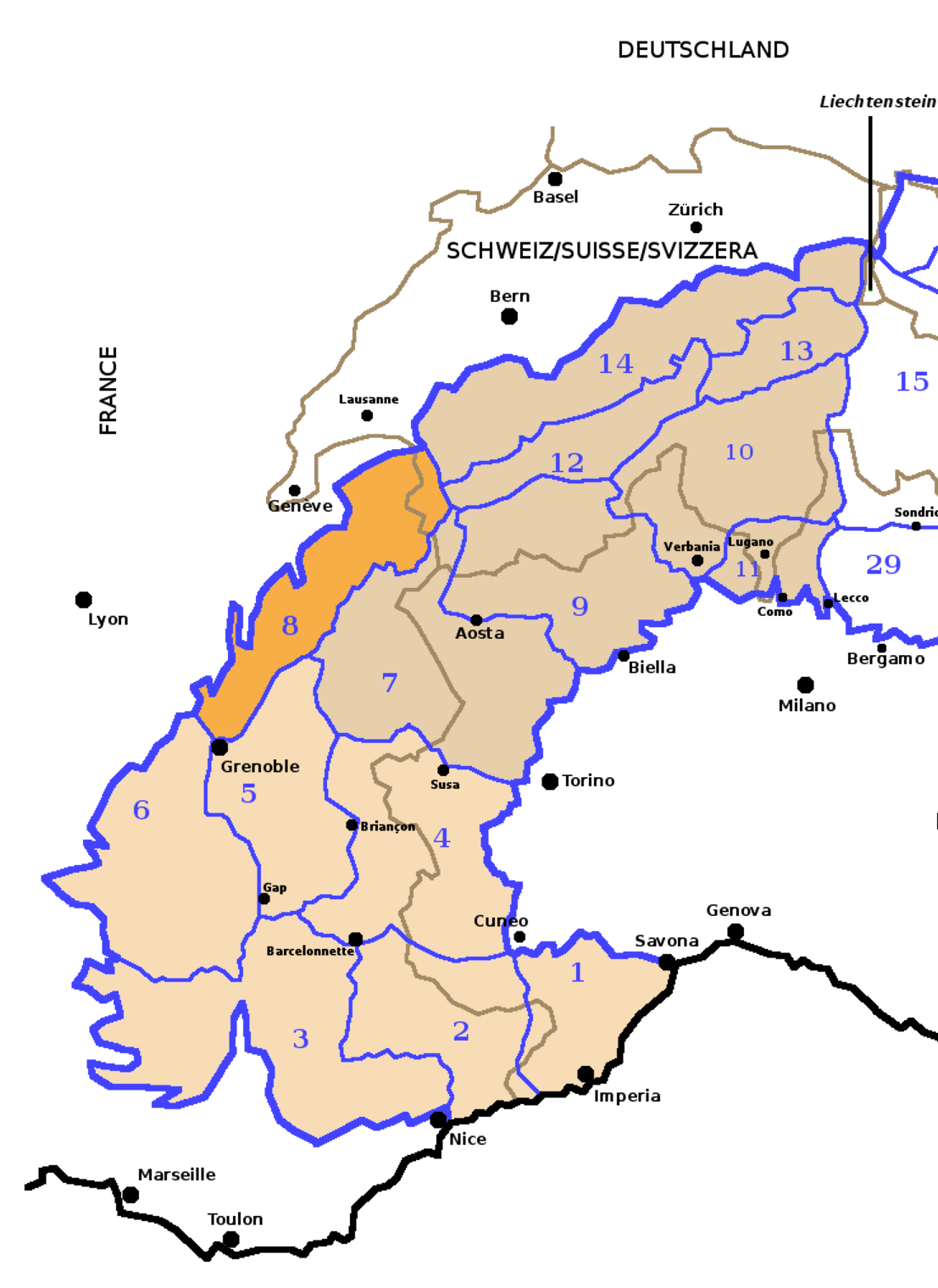 Alpi Occidentali secondo la SOIUSA con evidenziate le Prealpi di Savoia